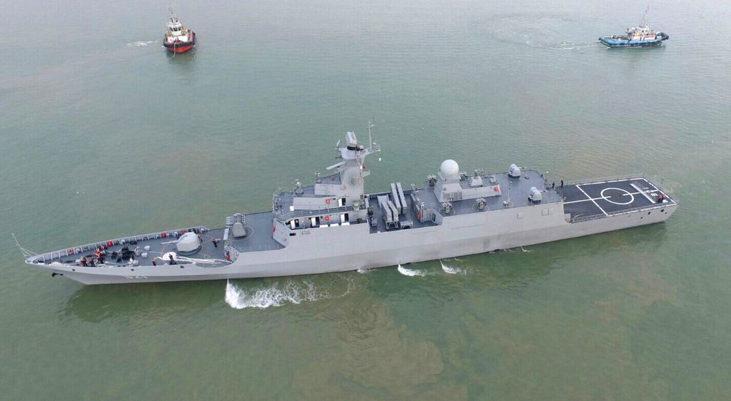 Corvette furtive lourde de classe C28A de la Marine algérienne, unité El Fateh 921.